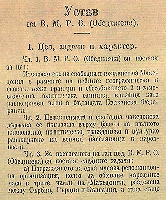 Устав на ВМРО (обединена).